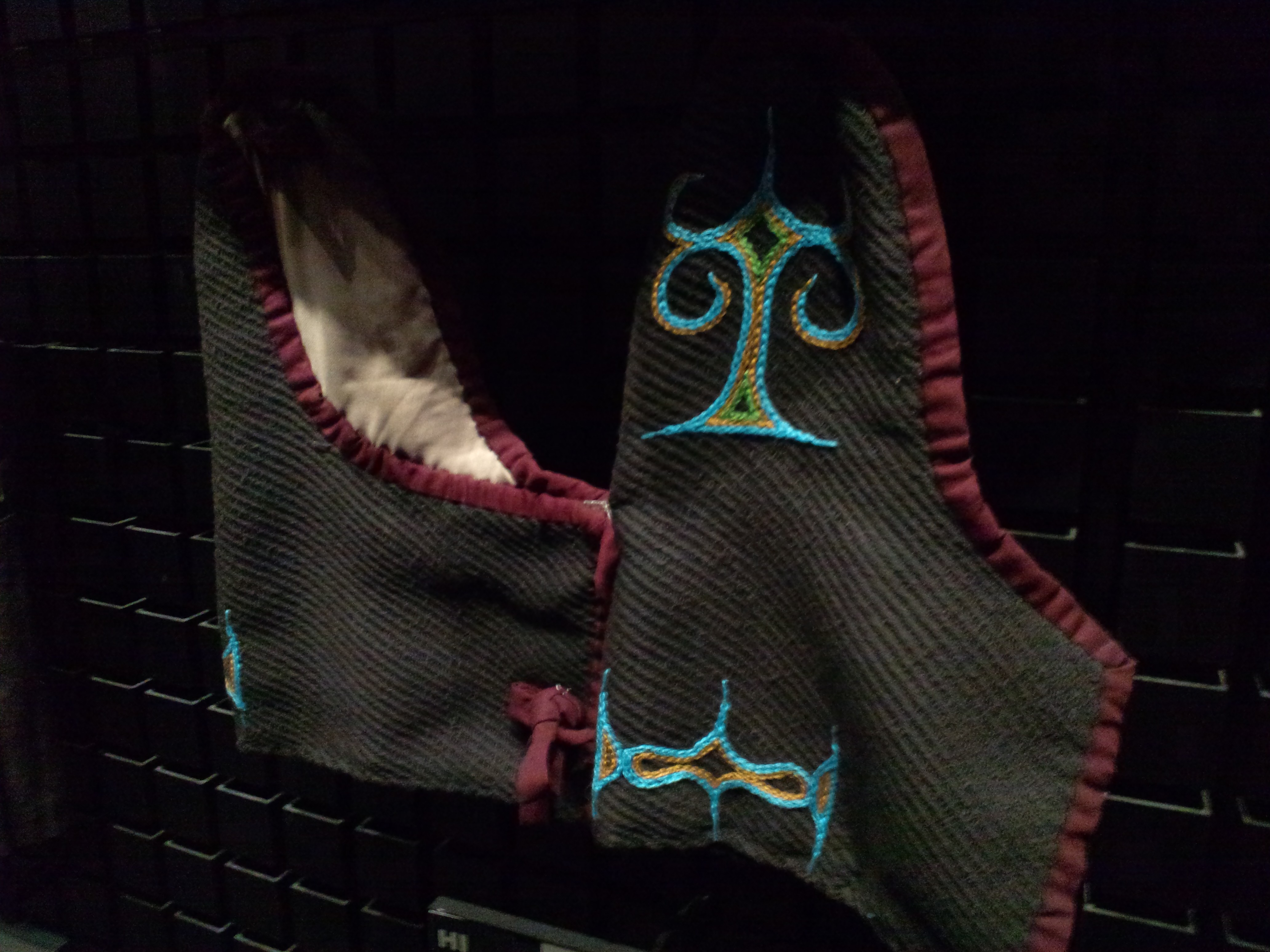 国立民族学博物館（大阪） 手甲（北海道、旭川）